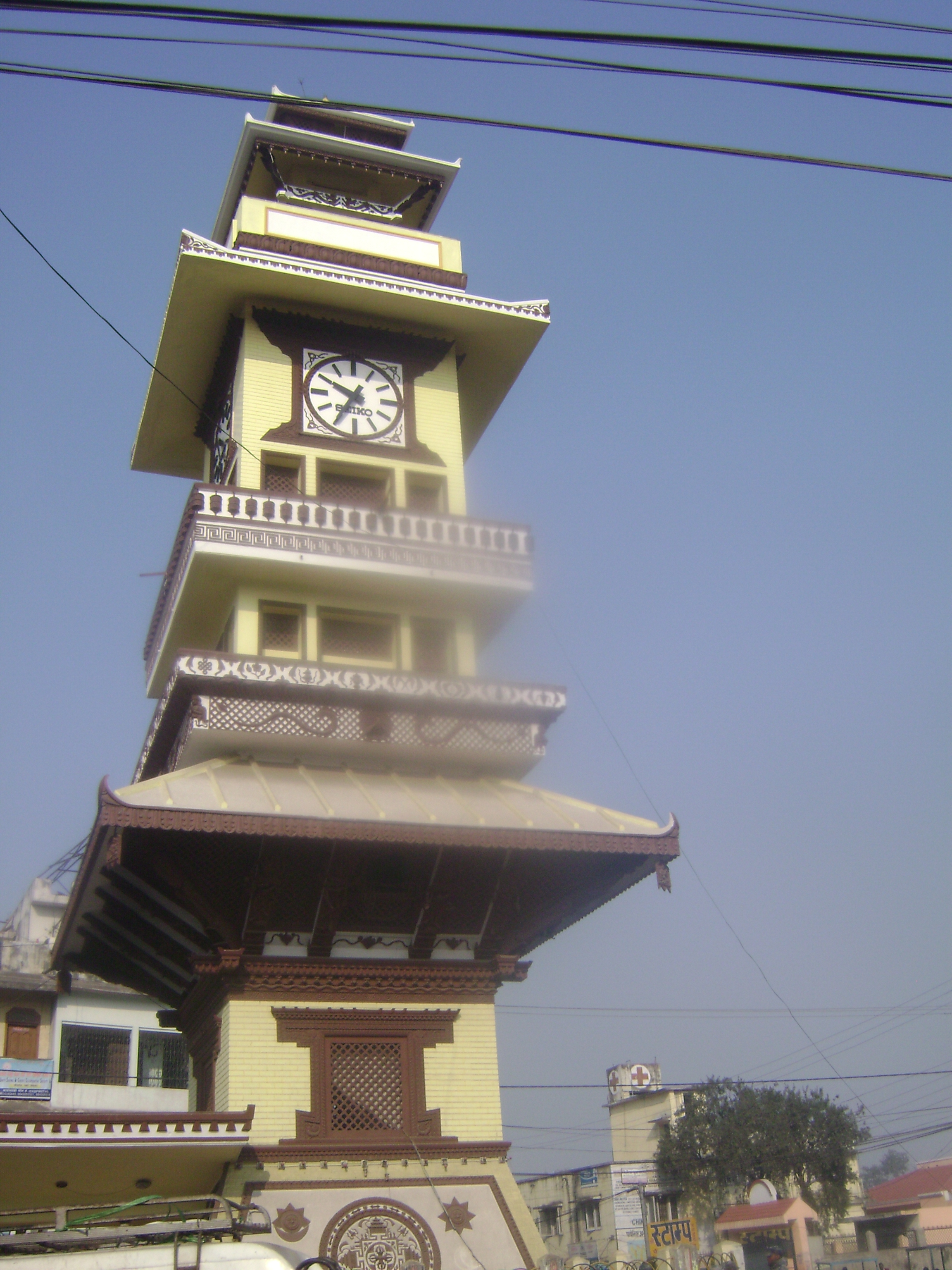 नेपाली: बिरगंजको घन्टाघर ।